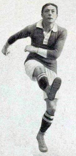 Charles Gondouin vers 1900.